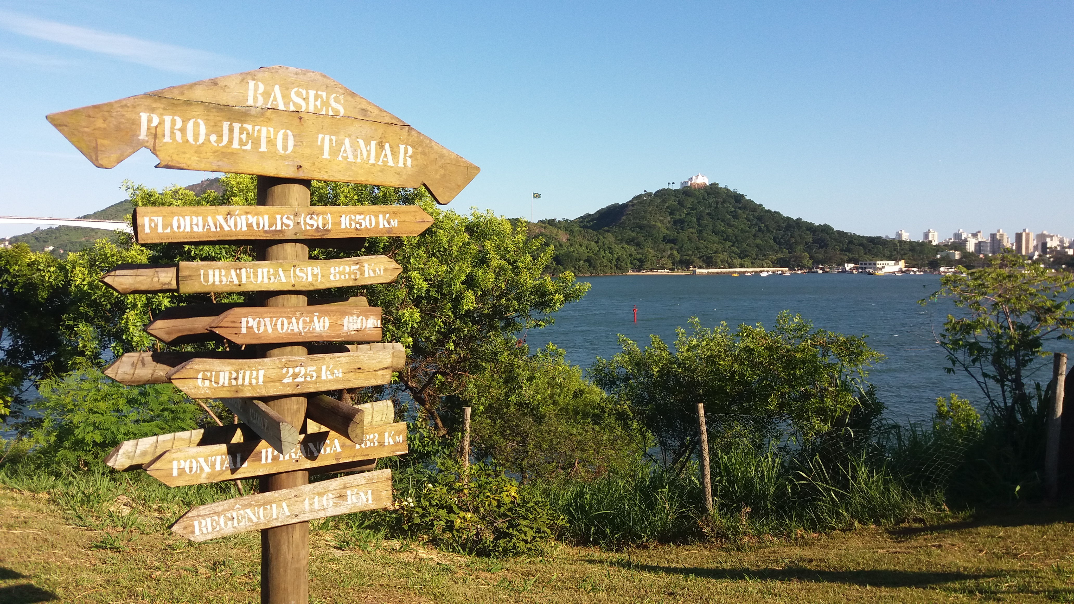 Projeto Tamar Vitória, em 2019